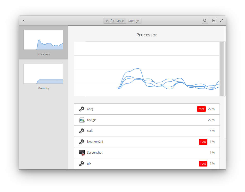 elementary OS上で動作するGNOME Usageのスクリーンショット。